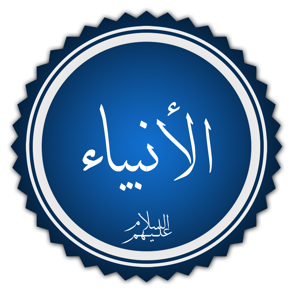 تخطيط كلمة الأنبياء عليهم السلام